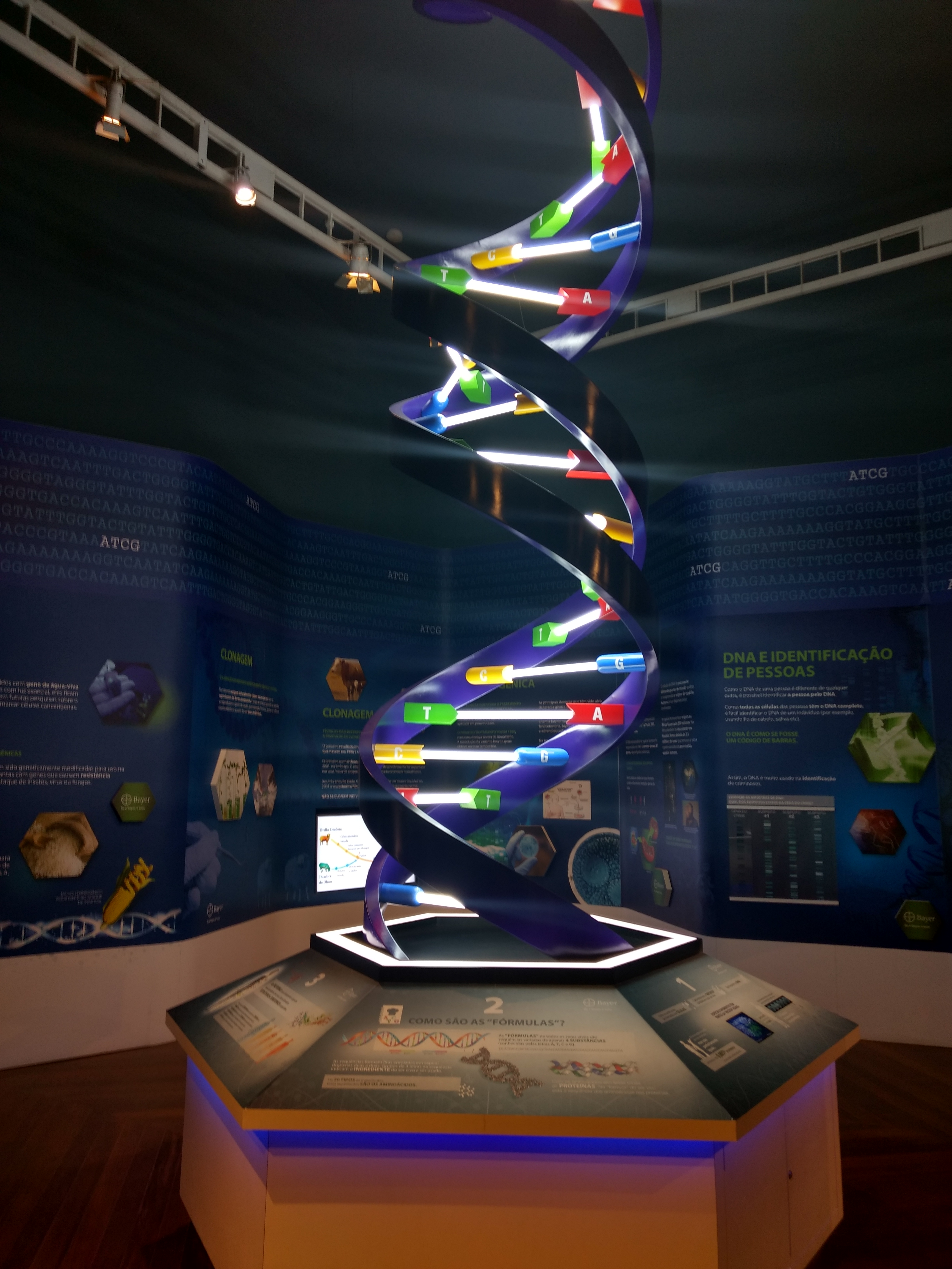 Catavento, DNA, escultura.Sp.